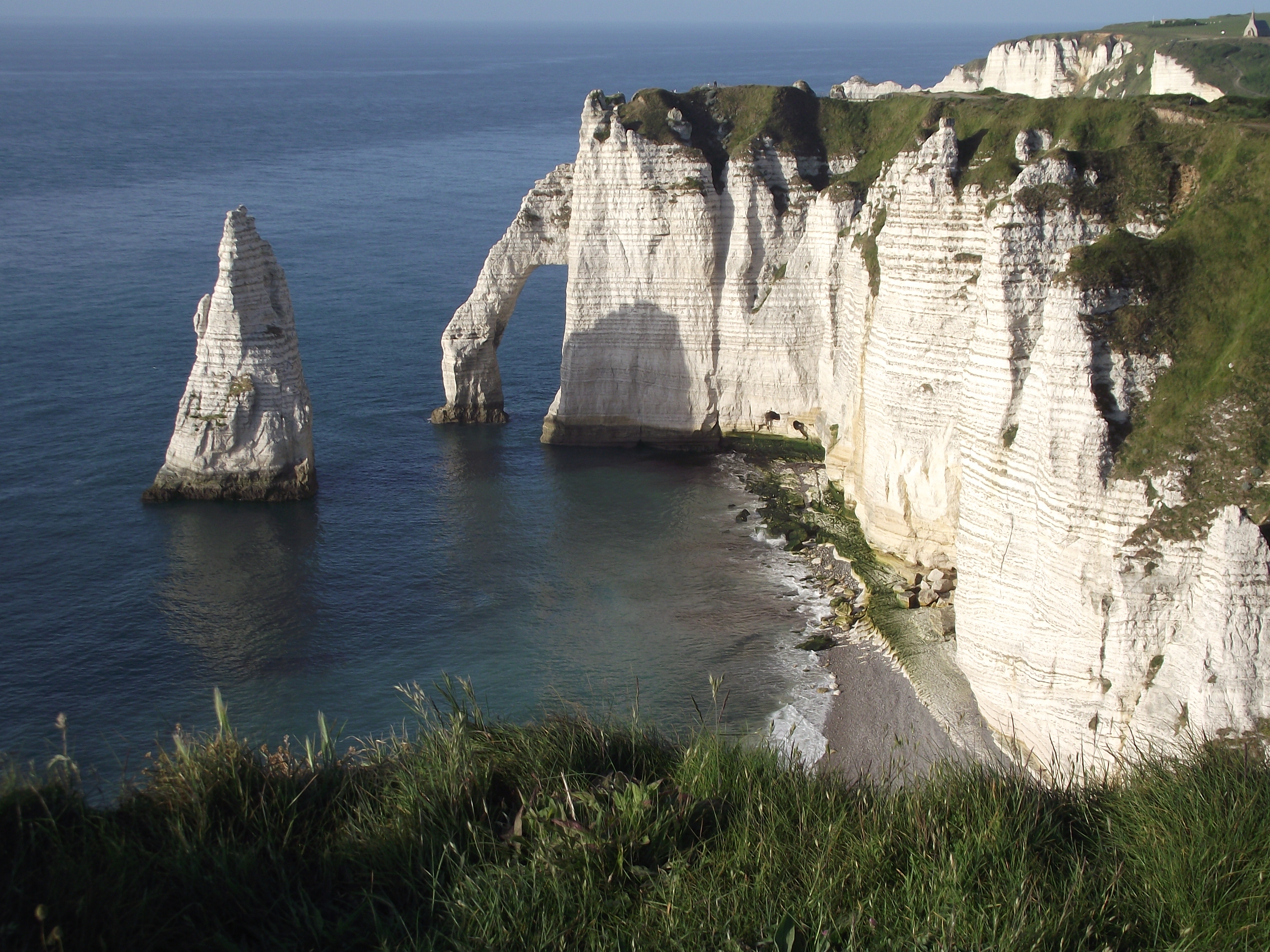 Étretat, Falaises, Porte d'Aval